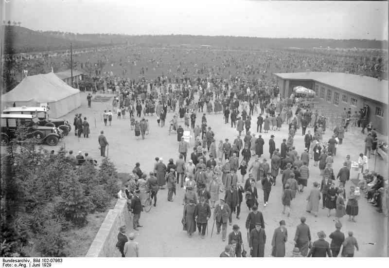 Die Eröffnung des grössten Volksparkes in Berlin! Der Goethe-Park, die ehenmaligen Rehberge in Berlin-Wedding, eine der schönsten und grössten Anlagen Berlins, wurde unter Anwesenheit von über 20000 Kindern und zehntausenden von Zuschauern feierlichst eröffnet. Blick auf die riesige Spielwiese des neuen Volks-Parkes Berlins nach der Eröffnung.